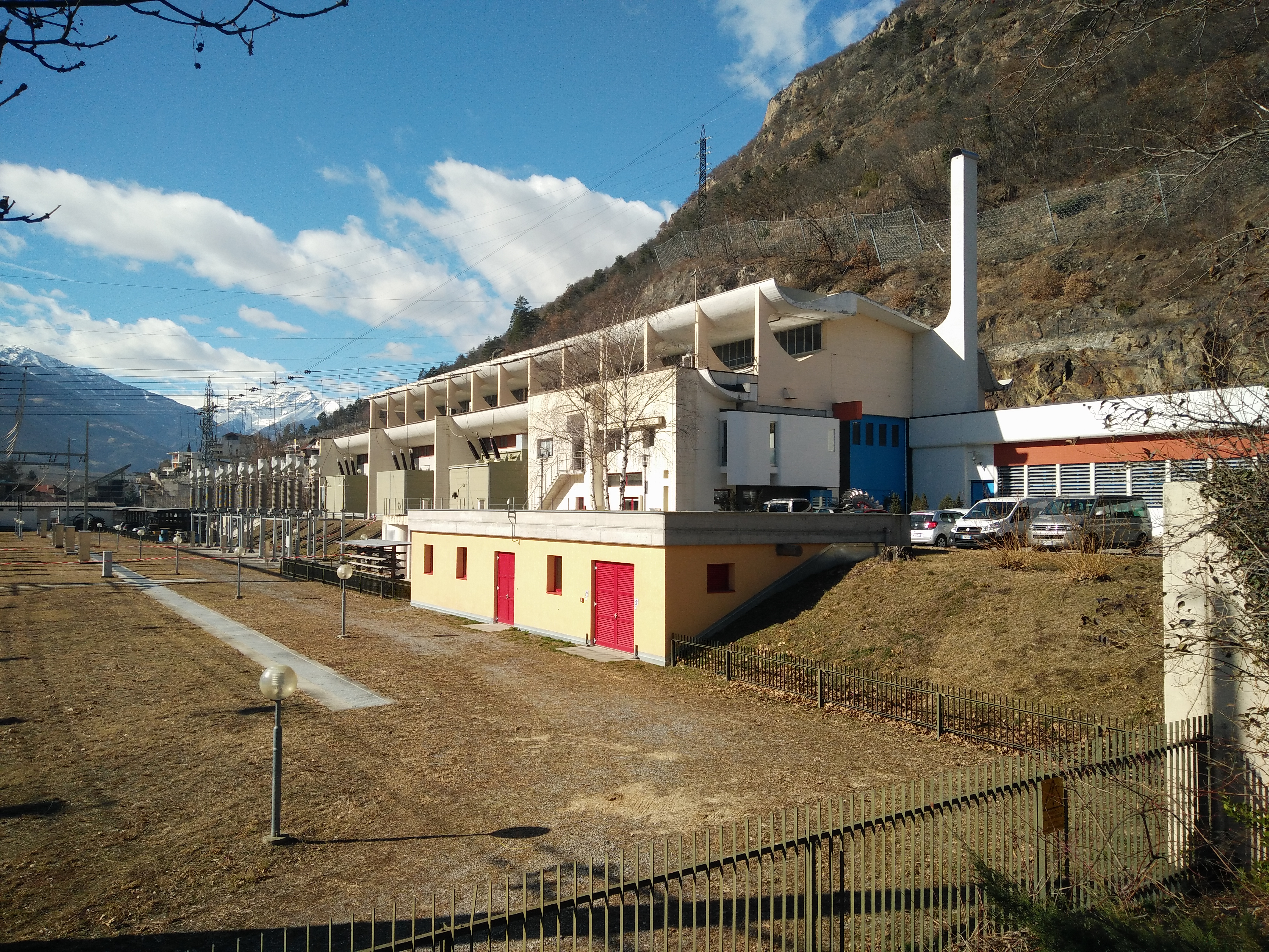 Kraftwerk Naturns Krafthaus Kamin